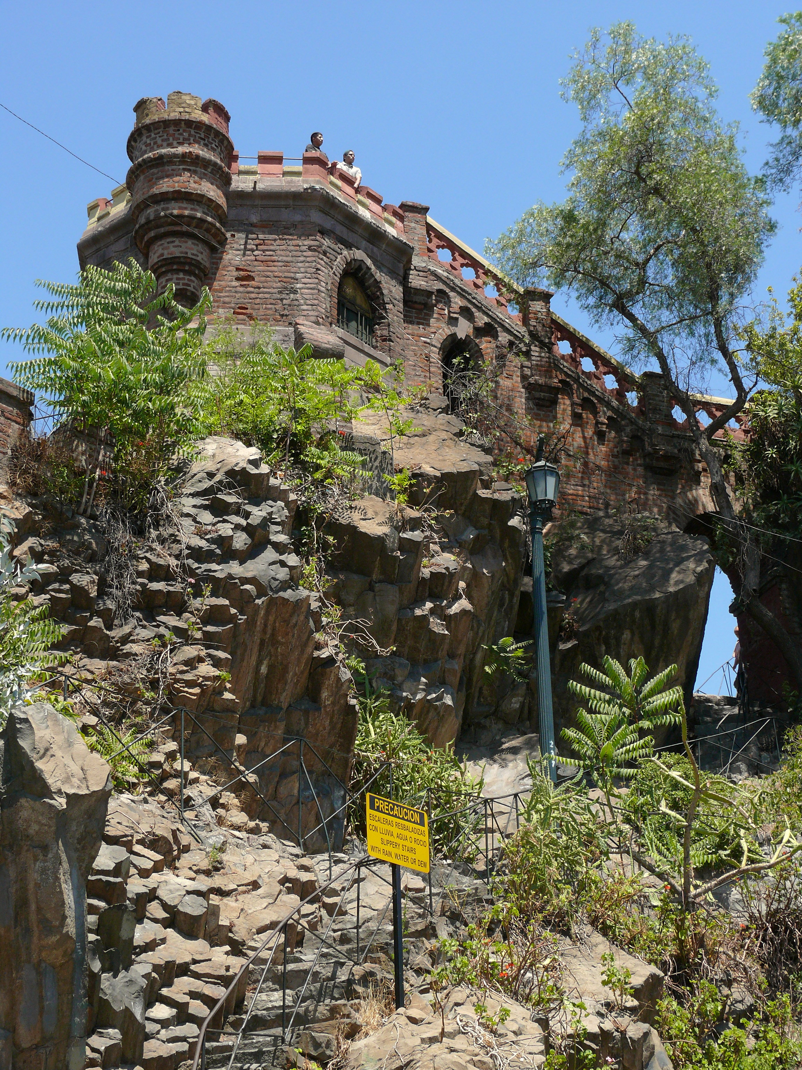 Mirador del Cerro Santa Lucía This is a photo of a national monument in Chile: 226